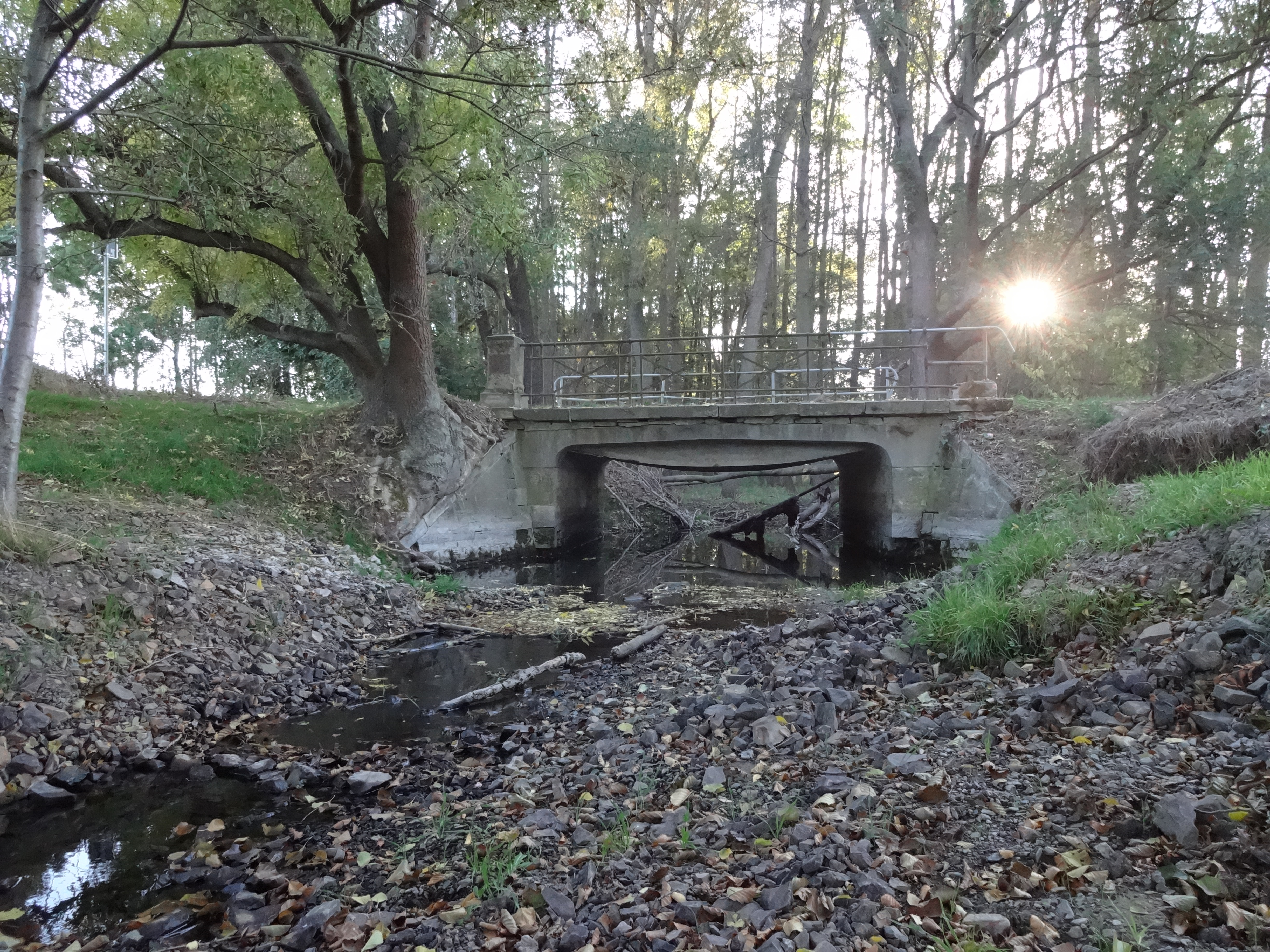 denkmalgeschützte Brücke über den Goldbach westlich von Börnecke